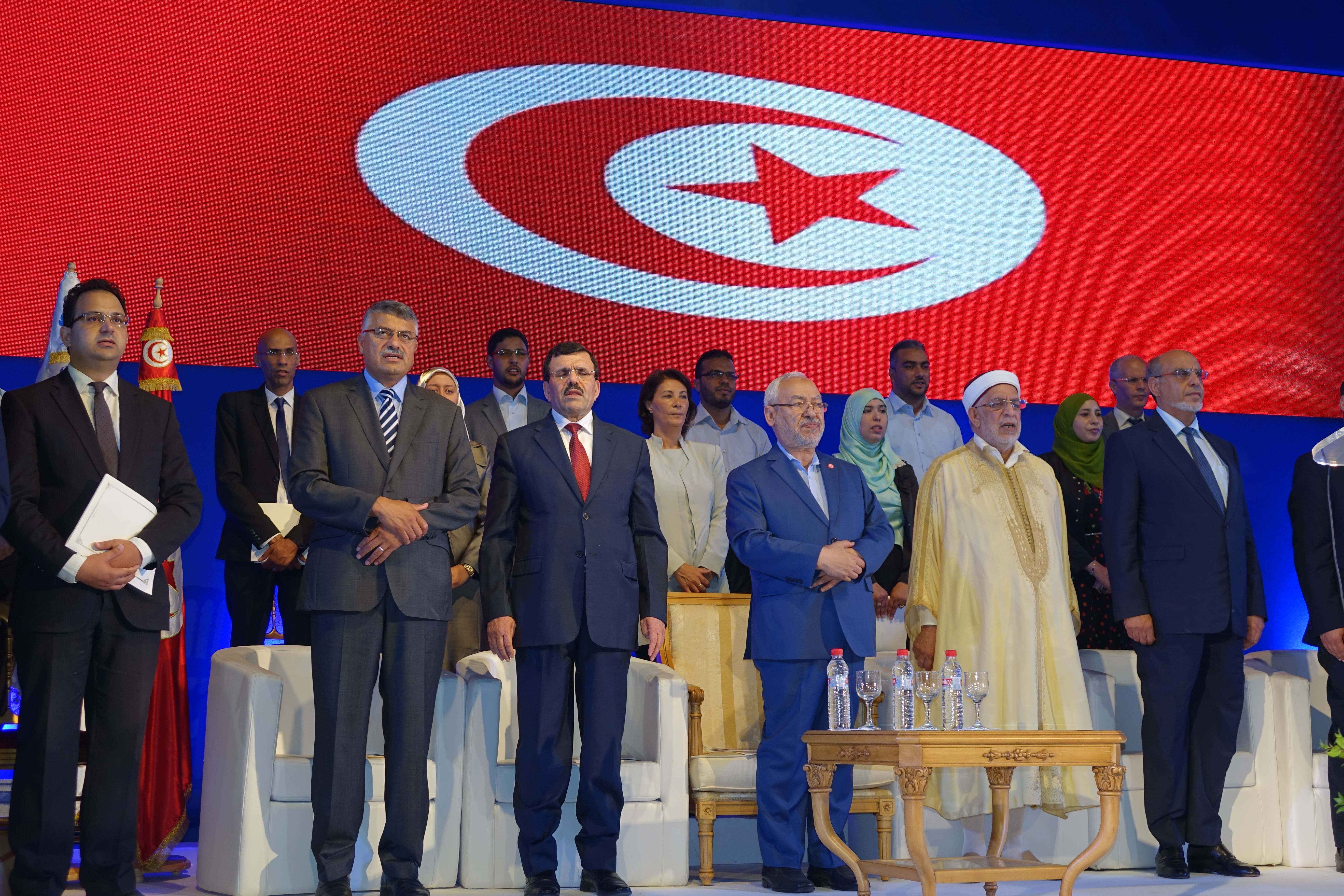 صور ندوة حركة النهضة للإعلان عن برنامجها الاقتصادي والاجتماعي أثناء ندوة حركة النهضة التونسية للإعلان عن برنامجها الاقتصادي والاجتماعي للانتخابات التشريعية التونسية 2014 في 23 سبتمبر 2014. Pendant la réunion du mouvement Ennahdha en Tunisie pour annoncer son programme économique et sociale pour les élections législatives tunisiennes en 2014, le 23 Septembre 2014.